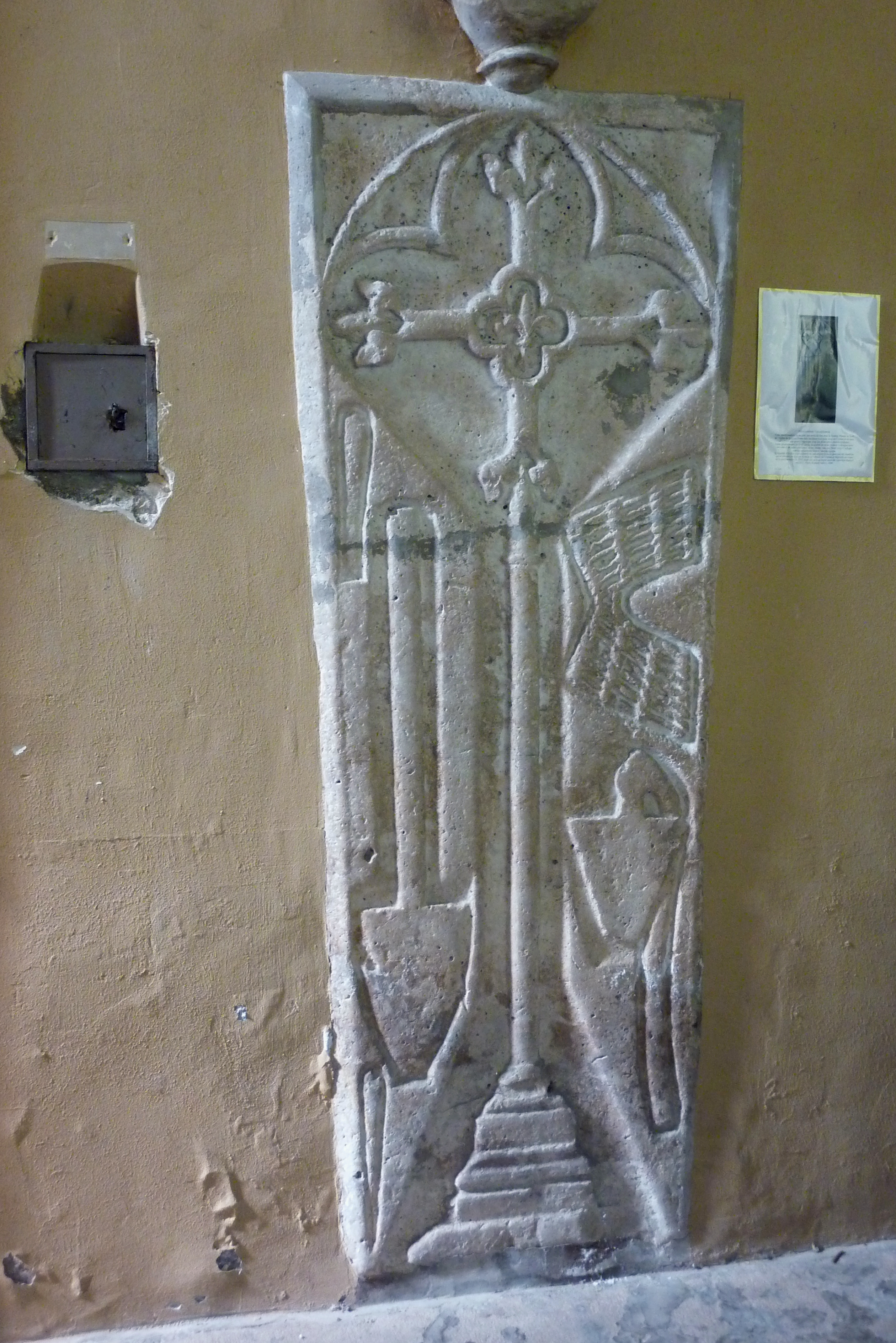 Katholische Pfarrkirche Saint-Clair-Saint-Léger in Souppes-sur-Loing im Département Seine-et-Marne in der Region Île-de-France (Frankreich), Grabplatte eines Landwirts, aus dem 16. Jahrhundert.